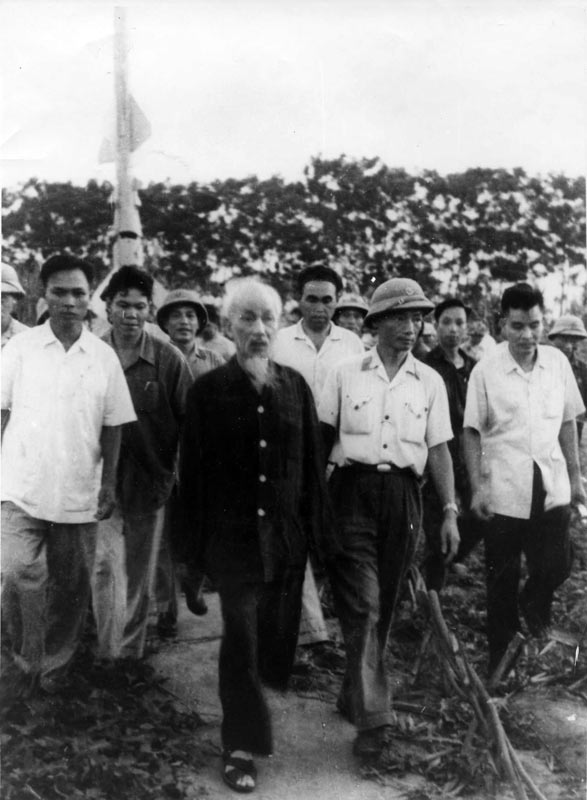 Президент Хо Ши Мин на огневой позиции 61-го зенитно-ракетного дивизиона (командиры капитан Хо Ши Хыу и майор И.К. Проскурнин) 236-го (Первого) ЗРП ВНА после боя, в котором дивизион тремя ракетами сбил 4 американских самолета. На втором плане майор И.К. Проскурнин. Снимок сделан 26 августа 1965 г. Фото прислал Николай Николаевич Колесник.